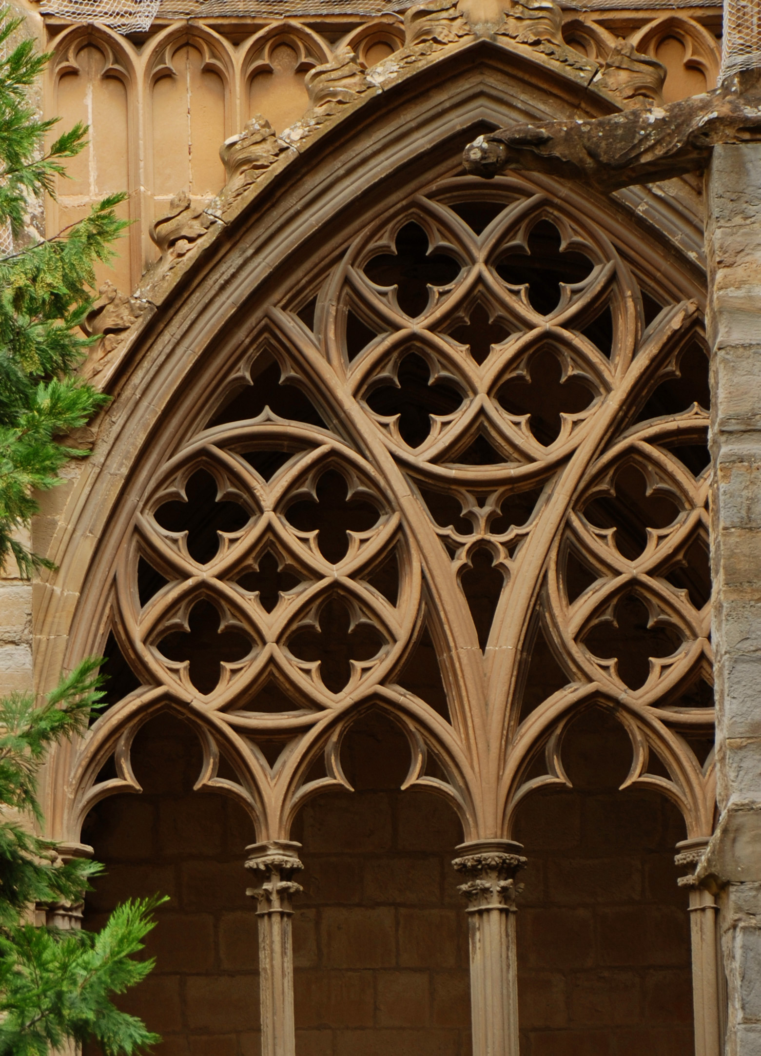 Tracería de la última etapa constructiva del claustro.